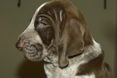 Ala D'Oro cucciolo di Bracco Italiano